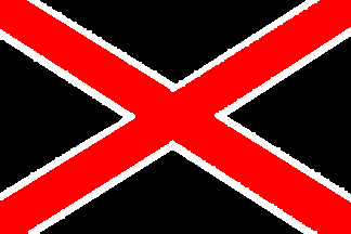 Bandera de ¿Morcillo, Cáceres? (España)